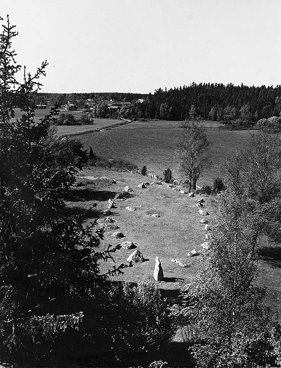 Skeppssättning. Bilden troligen från början av 1960-talet.